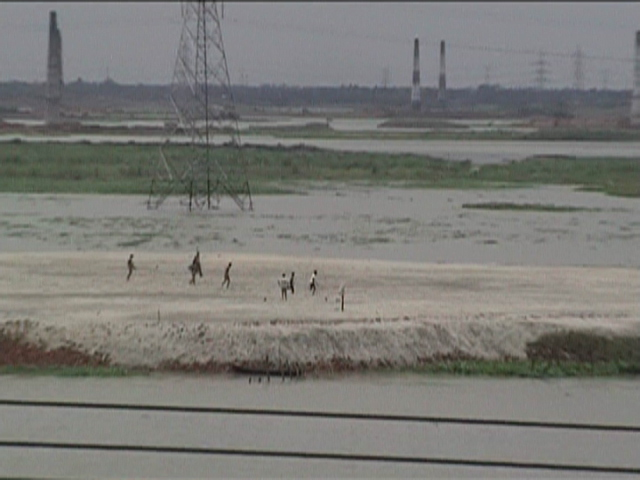 Turag River, Amin Bazar, Savar, Bangladesh.